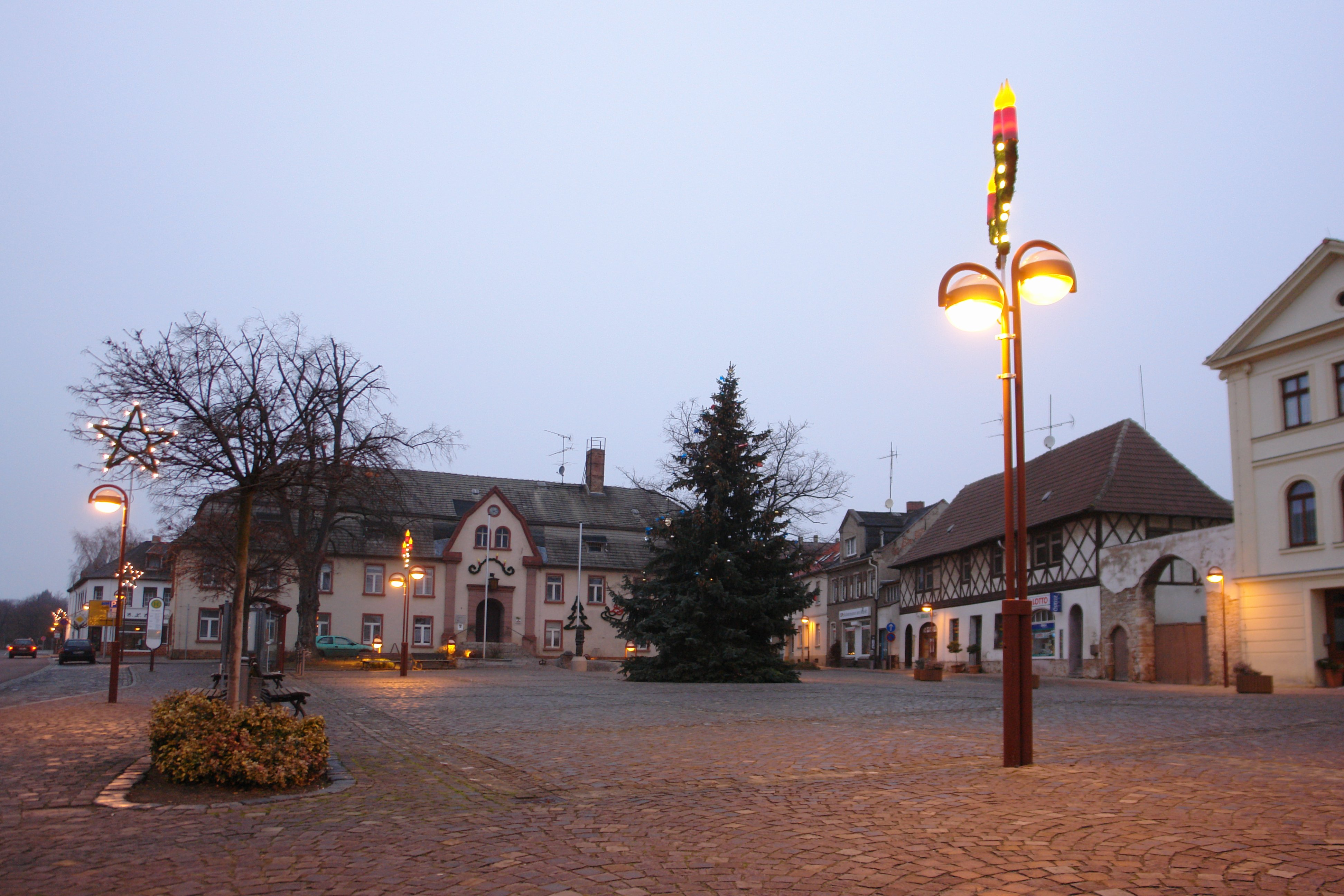 MarktplatzNieburg-Saale